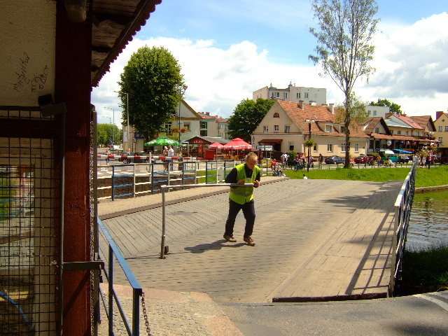 Most obrotowy w Giżycku